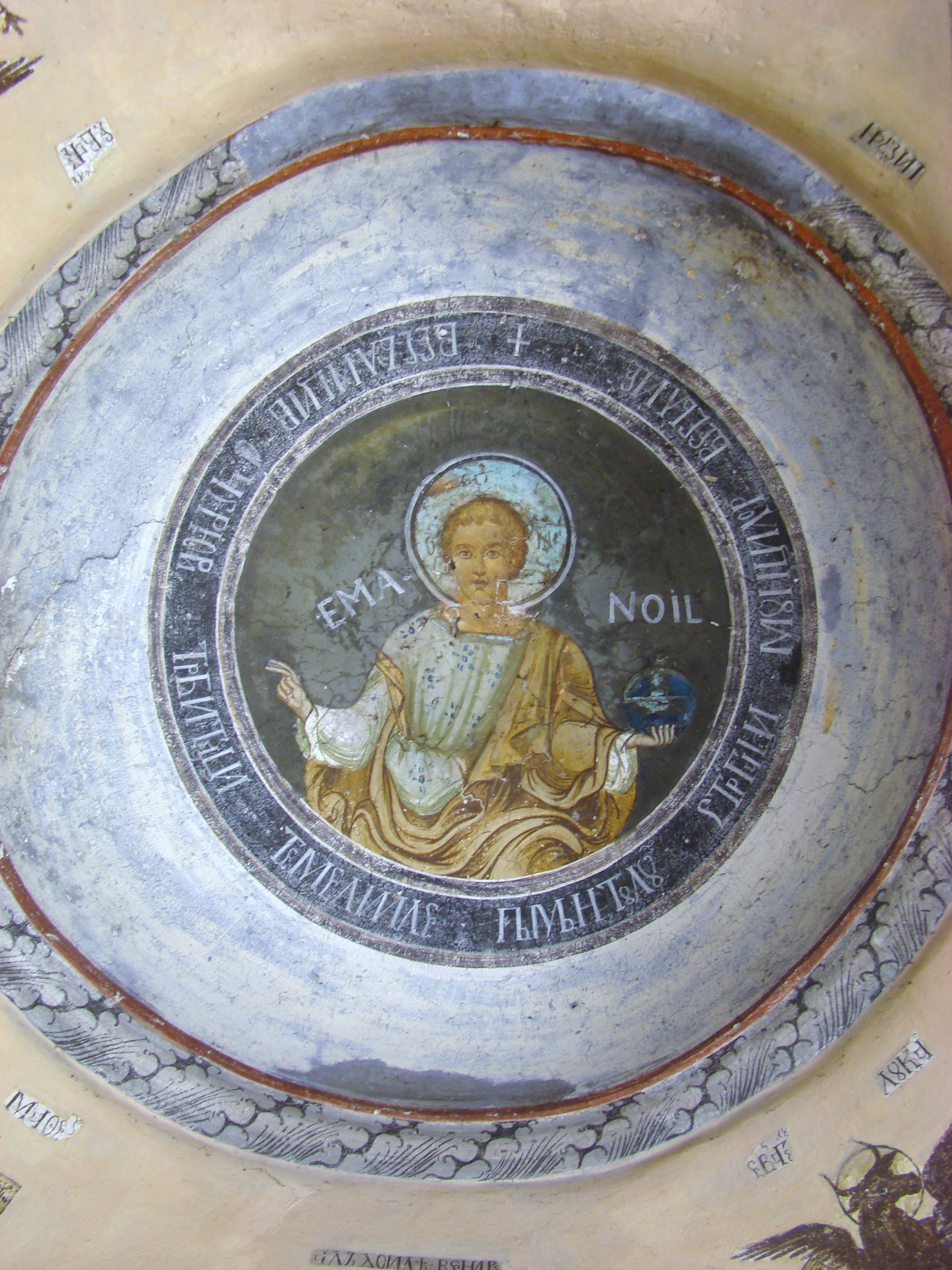 Biserica „Toți Sfinții” din Călugăreasa, județul Gorj